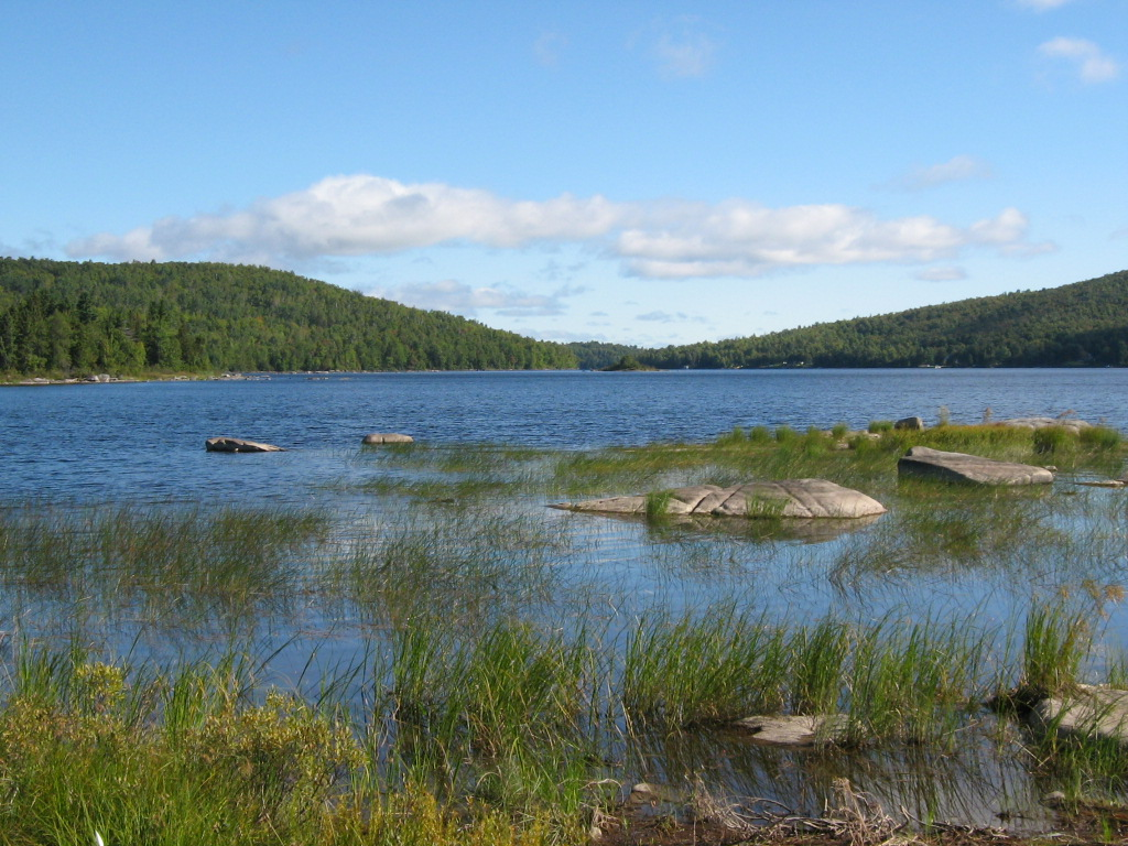 Vue de la baie Sauvage du sentier des Grands Pins située dans le parc national de Frontenac